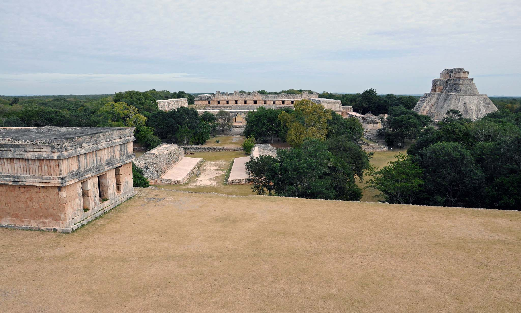 Vista panorámica de Uxmal desde el Palacio del gobernador.